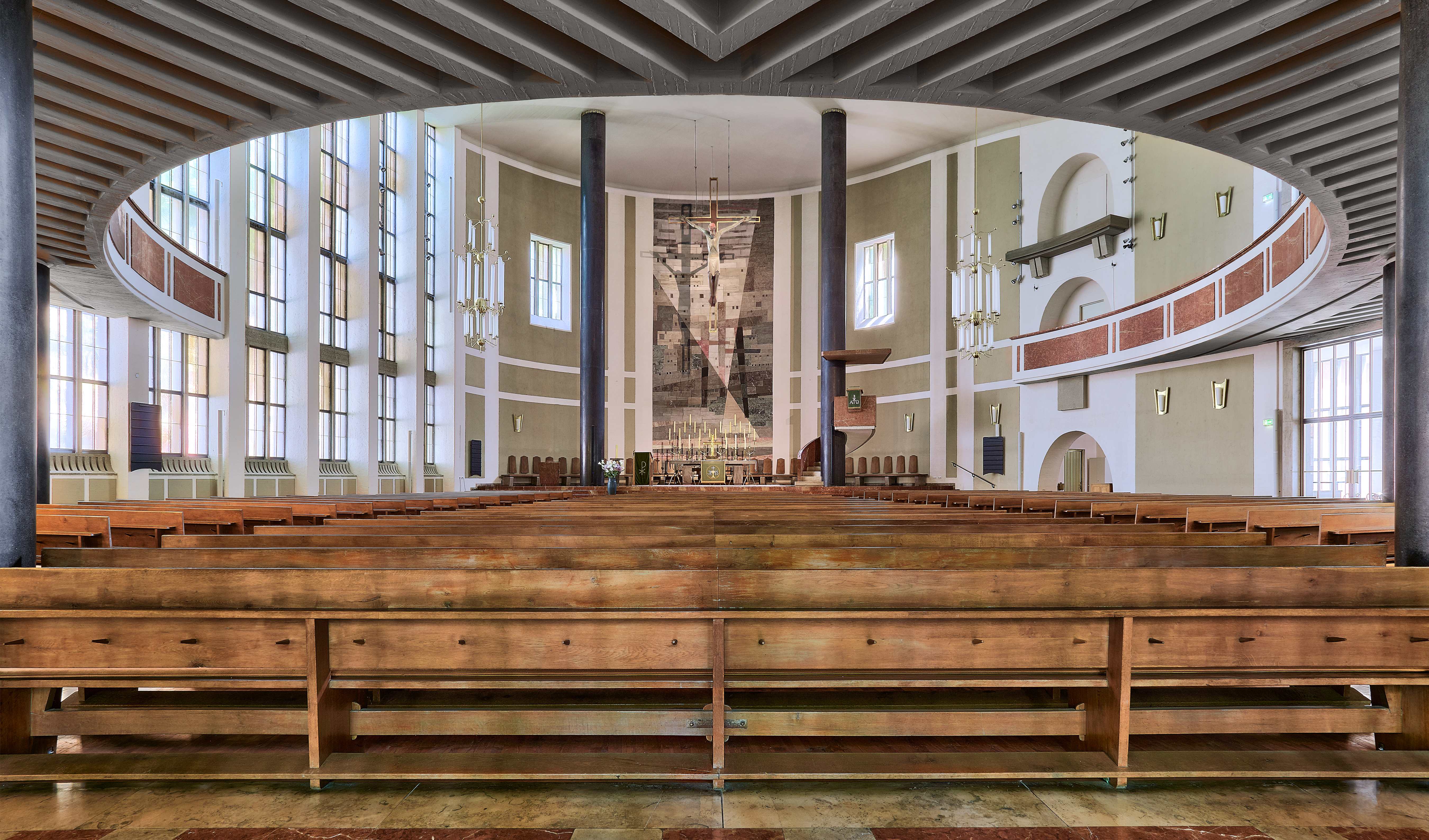 Moderner Kirchenbau im 50-Jahre Stil. Bischofskirche.This is a photograph of an architectural monument.